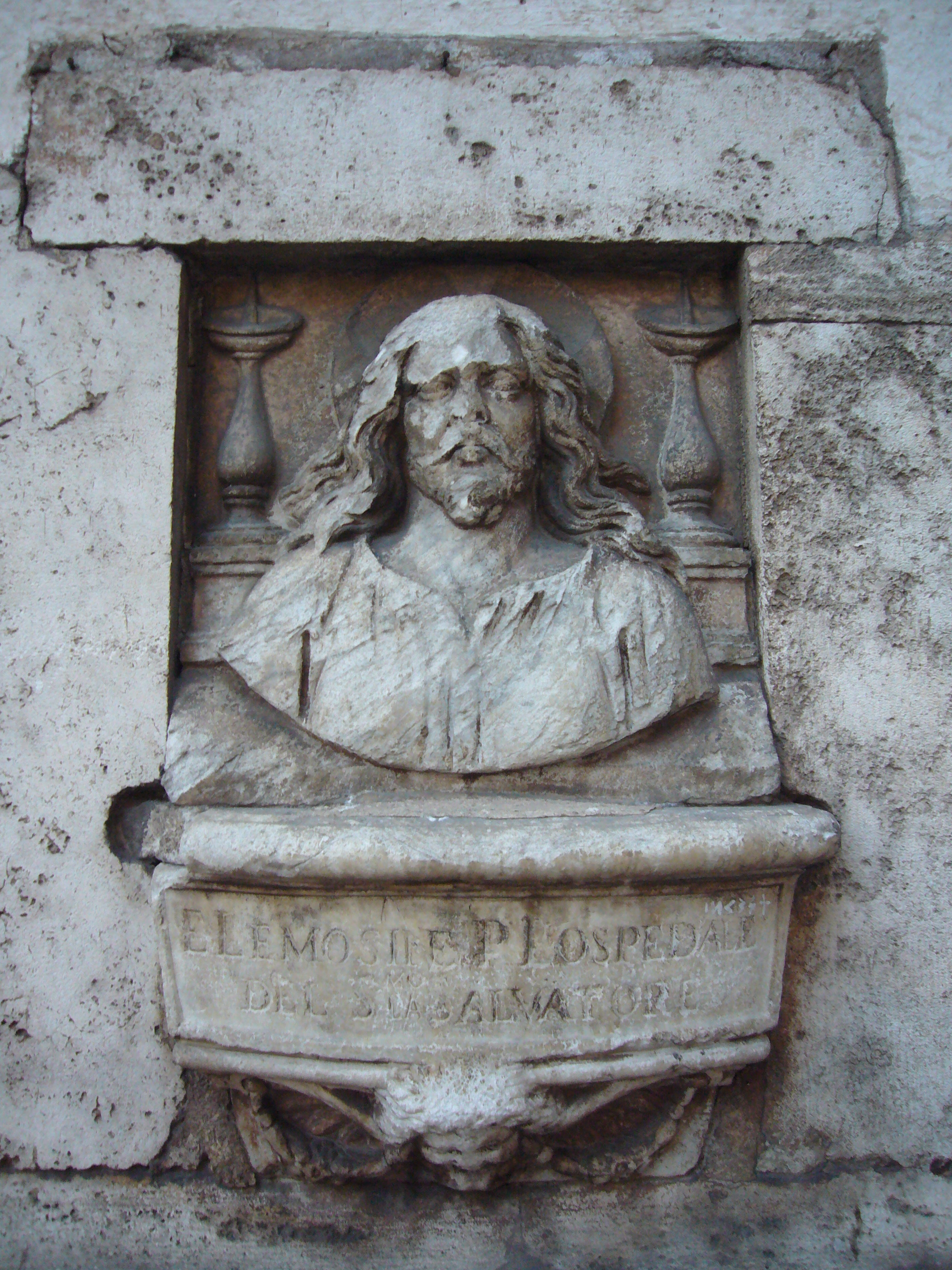 Roma, piazza s. Giovanni. Elemosiniera dell'Ospedale del Salvatore con l'emblema del Salvatore